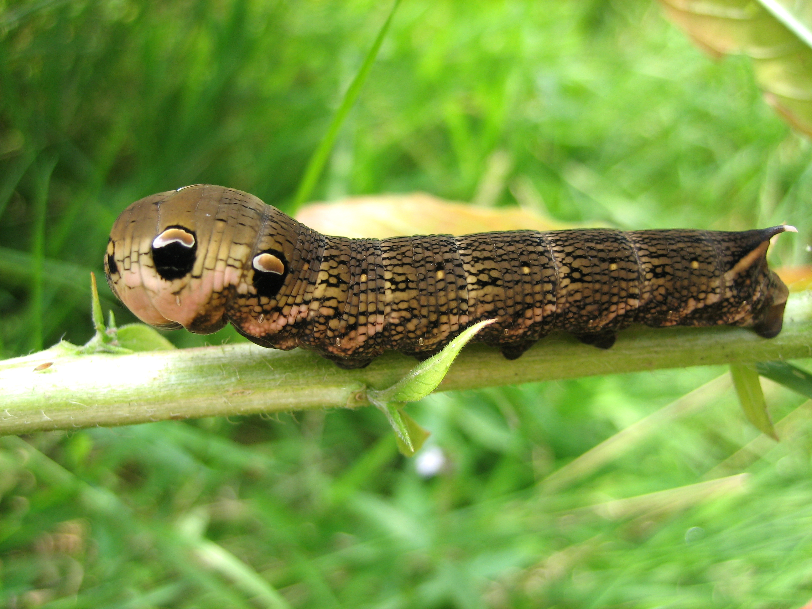 Deilephila elpenor, caterpillar